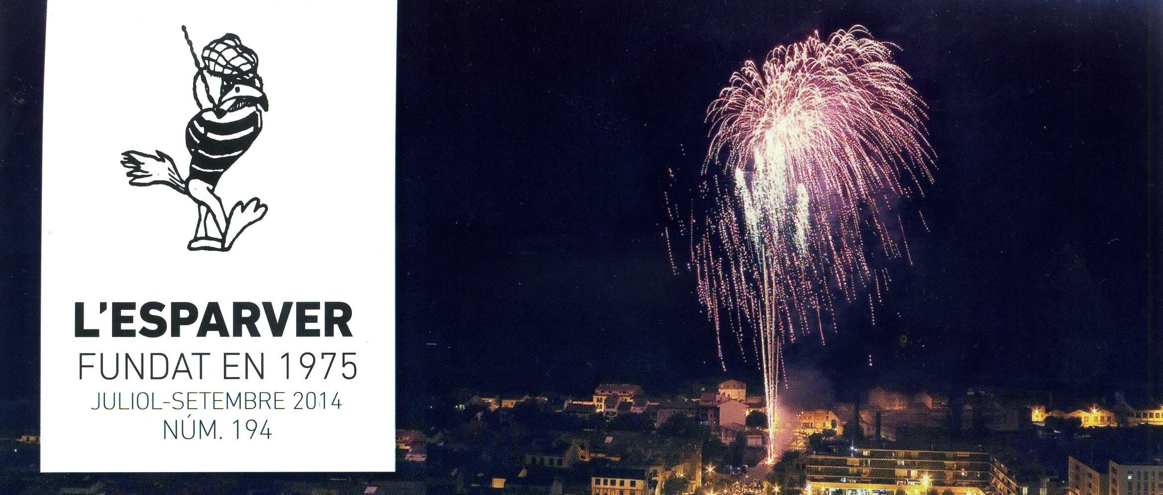 Resvista local de Sallent, L'esparver fundat en 1975